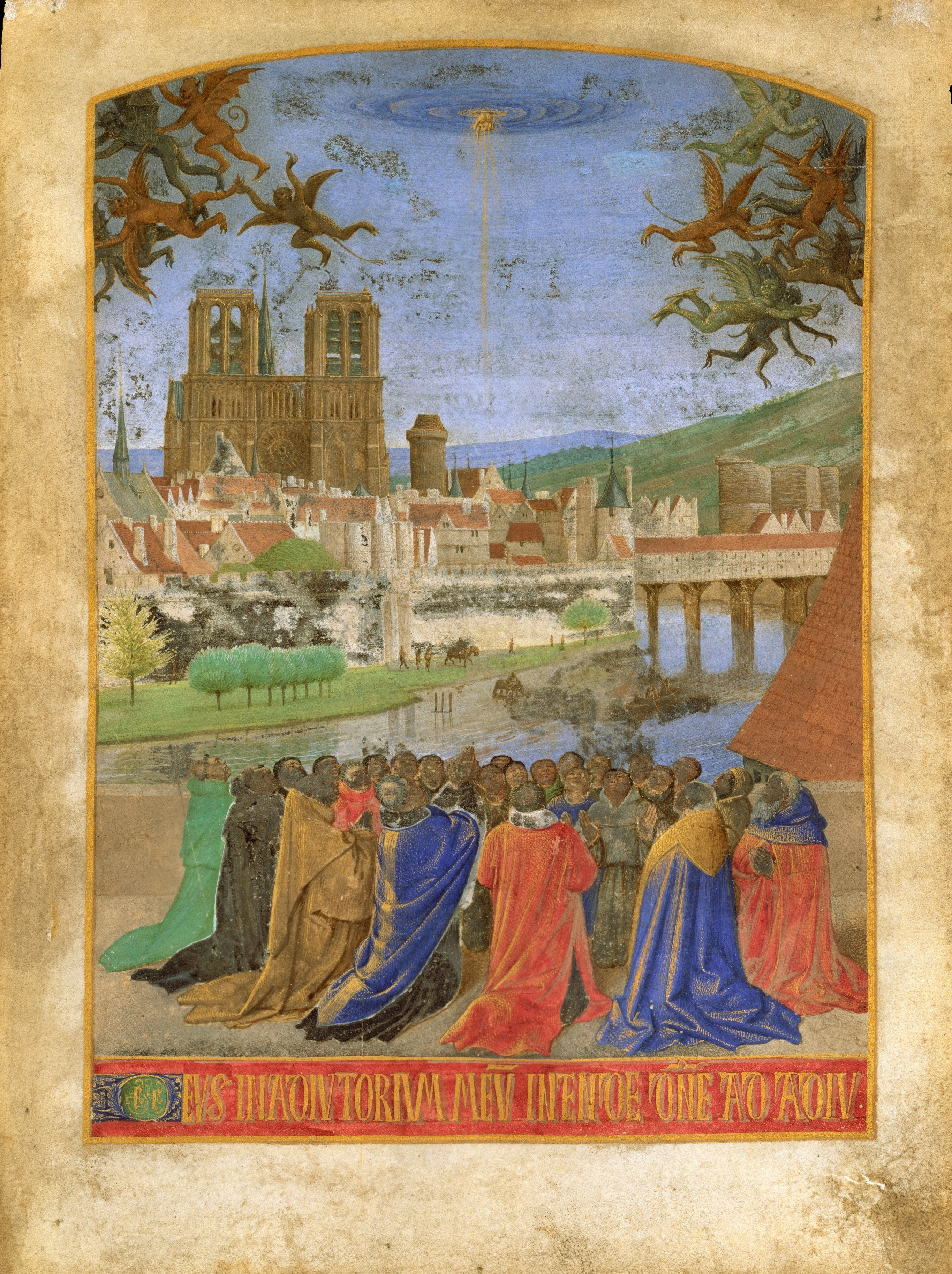 La Descente du Saint-Esprit (The Right Hand of God Protecting the Faithful against the Demons). Heures d'Étienne Chevalier, enluminées par Jean Fouquet. New York, The Metropolitan Museum of Art, Collection Robert Lehman, 1975 (Inv.1975.1.2490) 1984 The Metropolitan Museum of Art. Fouquet a resitué l'épisode du Nouveau Testament évoquant la descente du Saint-Esprit sur les fidèles assidus à la prière, dans un paysage parisien. L'assemblée est placée au niveau de l'hôtel de Nesle depuis un point de vue qui laisse découvrir la partie sud de la Cité. À droite, le pont Saint-Michel enjambe le bras de la Seine devant le Petit Châtelet. Viennent ensuite les toitures de l'Hôtel-Dieu et la tour de l'évêché, puis l'imposante façade de Notre-Dame. Devant la cathédrale s'étend le quartier dense de la rue Neuve-Notre-Dame, où se pratiquaient les métiers du livre.